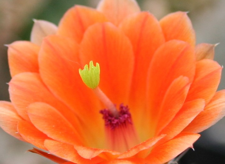 Echinocereus scheeri subsp. scheeri (Echinocereus scheeri var. obscuriensis)